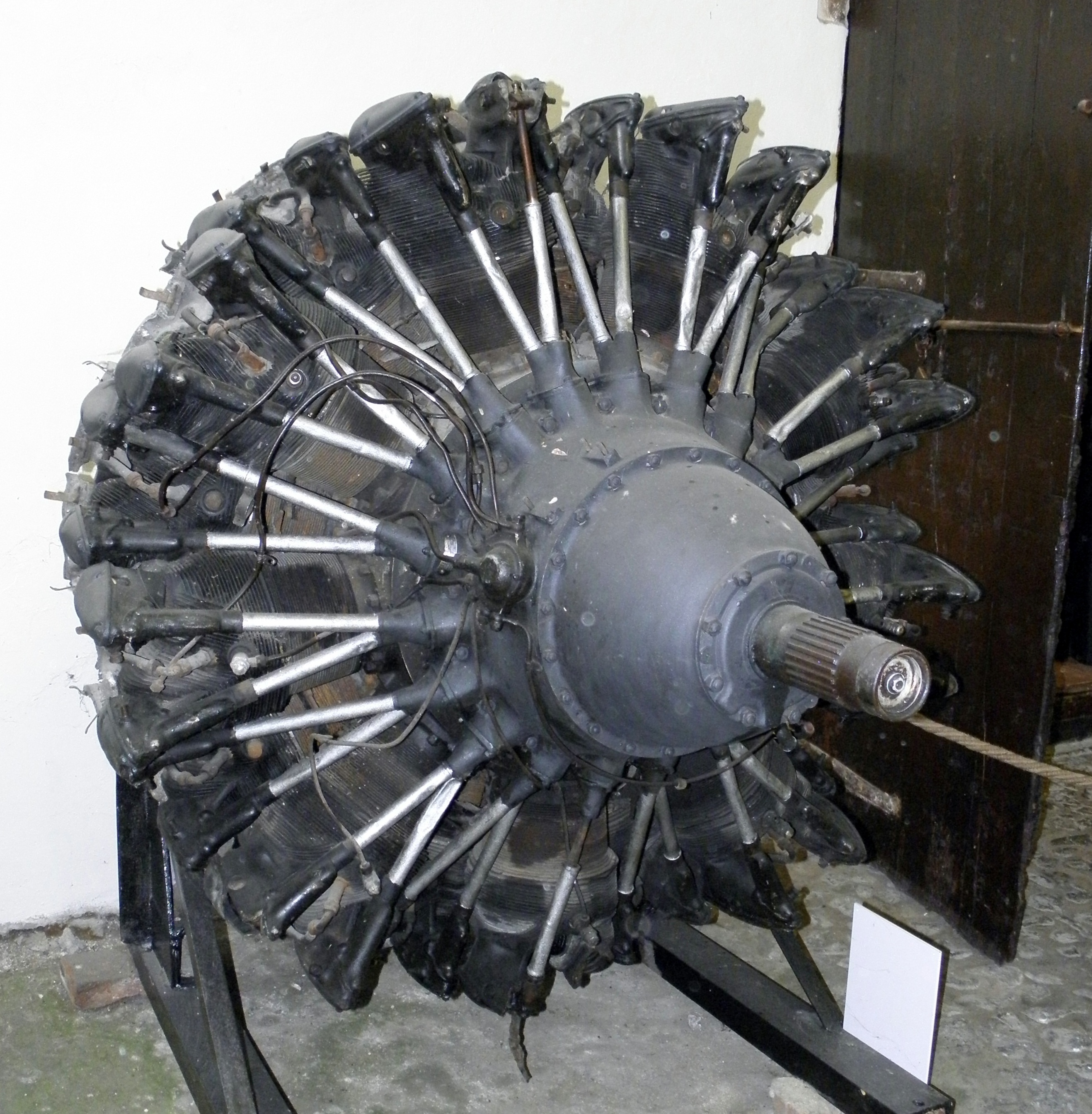 San Pelagio, frazione di Due carrare: Museo dell'aria e dello spazio, il motore aeronautico Piaggio P.XII in esposizione al museo.